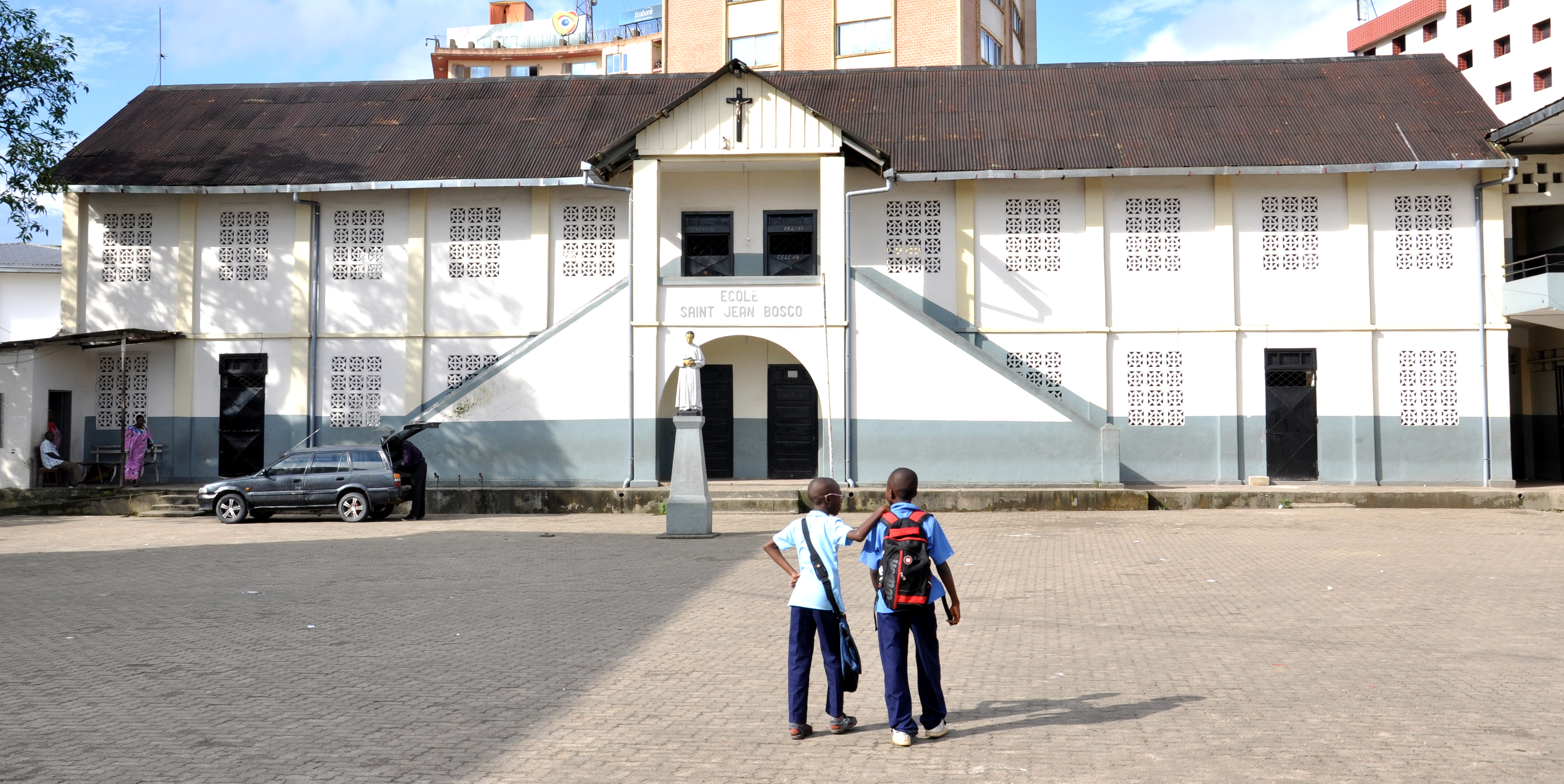 École St Jean Bosco